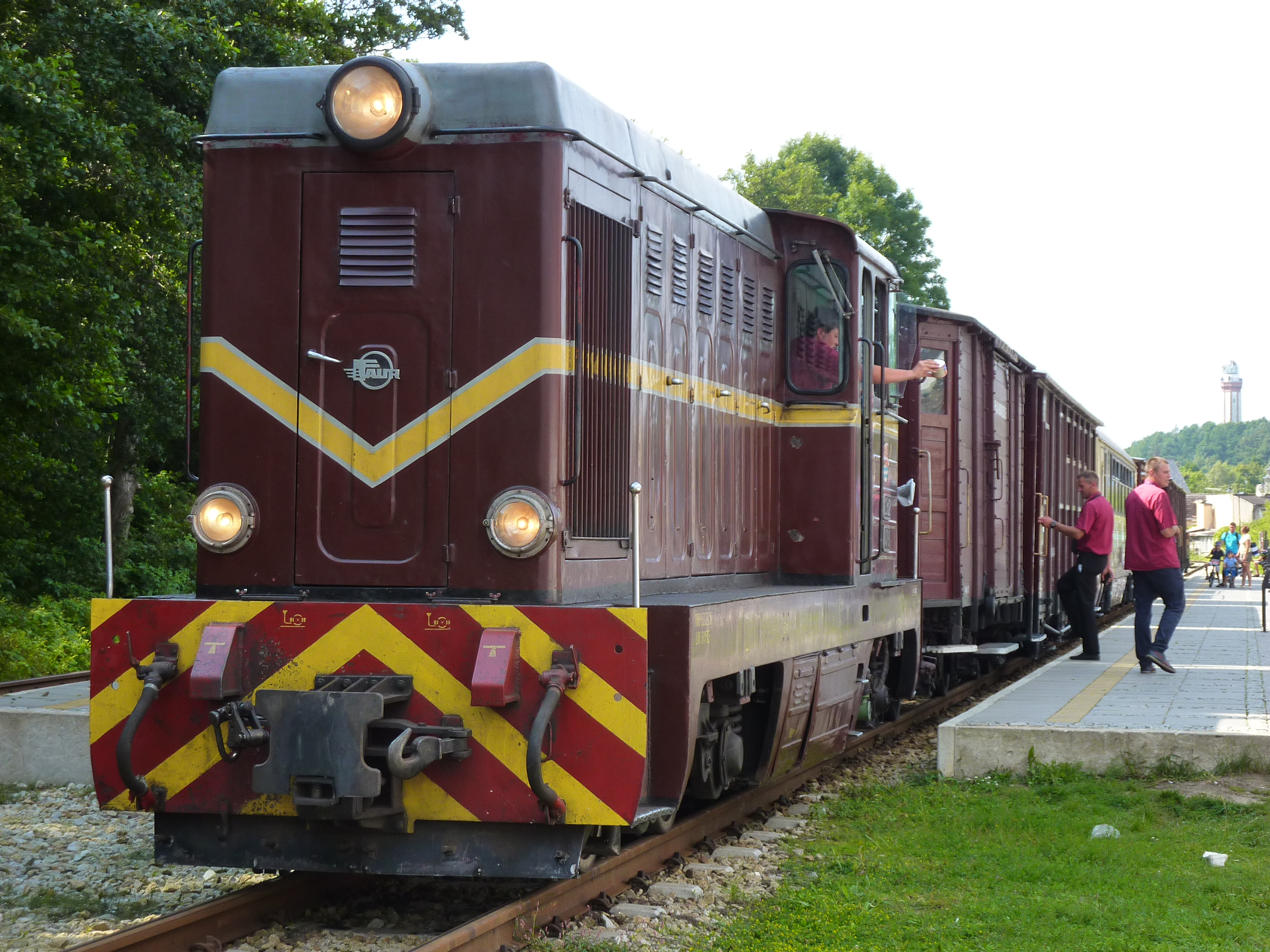 Pociąg Gryfickiej Kolei Wąskotorowej na stacji w Niechorzu. W tle widoczna latarnia morska w Niechorzu.